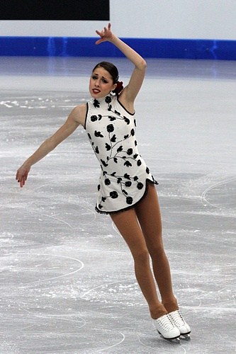 Кароль Брессанутти (италия) на чемпионате мира по фигурному катанию среди юниоров 2012